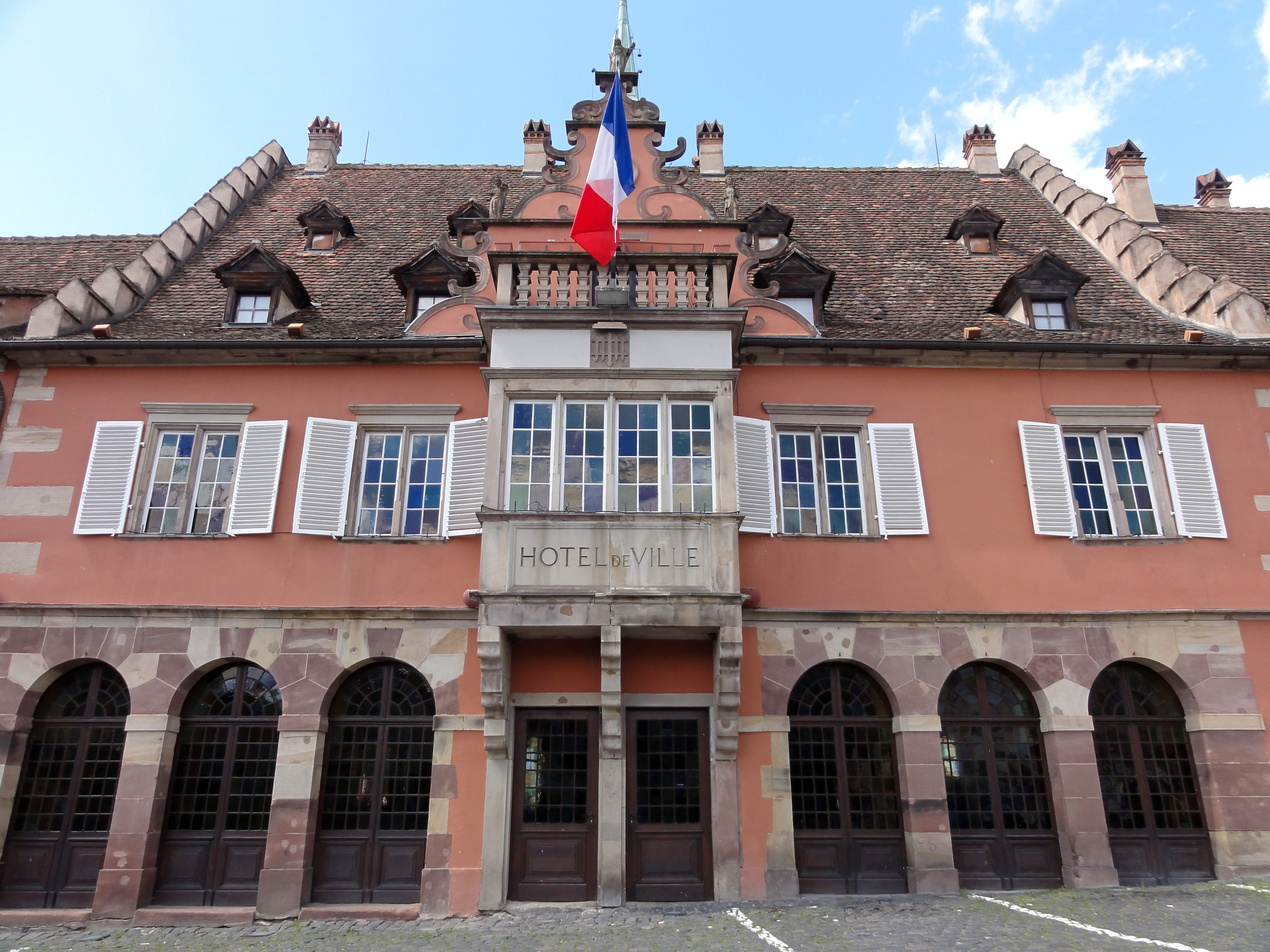 Alsace, Bas-Rhin, Barr, Hôtel de ville, ancien château dit "Kleppernburg" ou "Wepfermannsburg" (1641), 1 place de l’Hôtel-de-Ville (PA00084600, IA00115076).